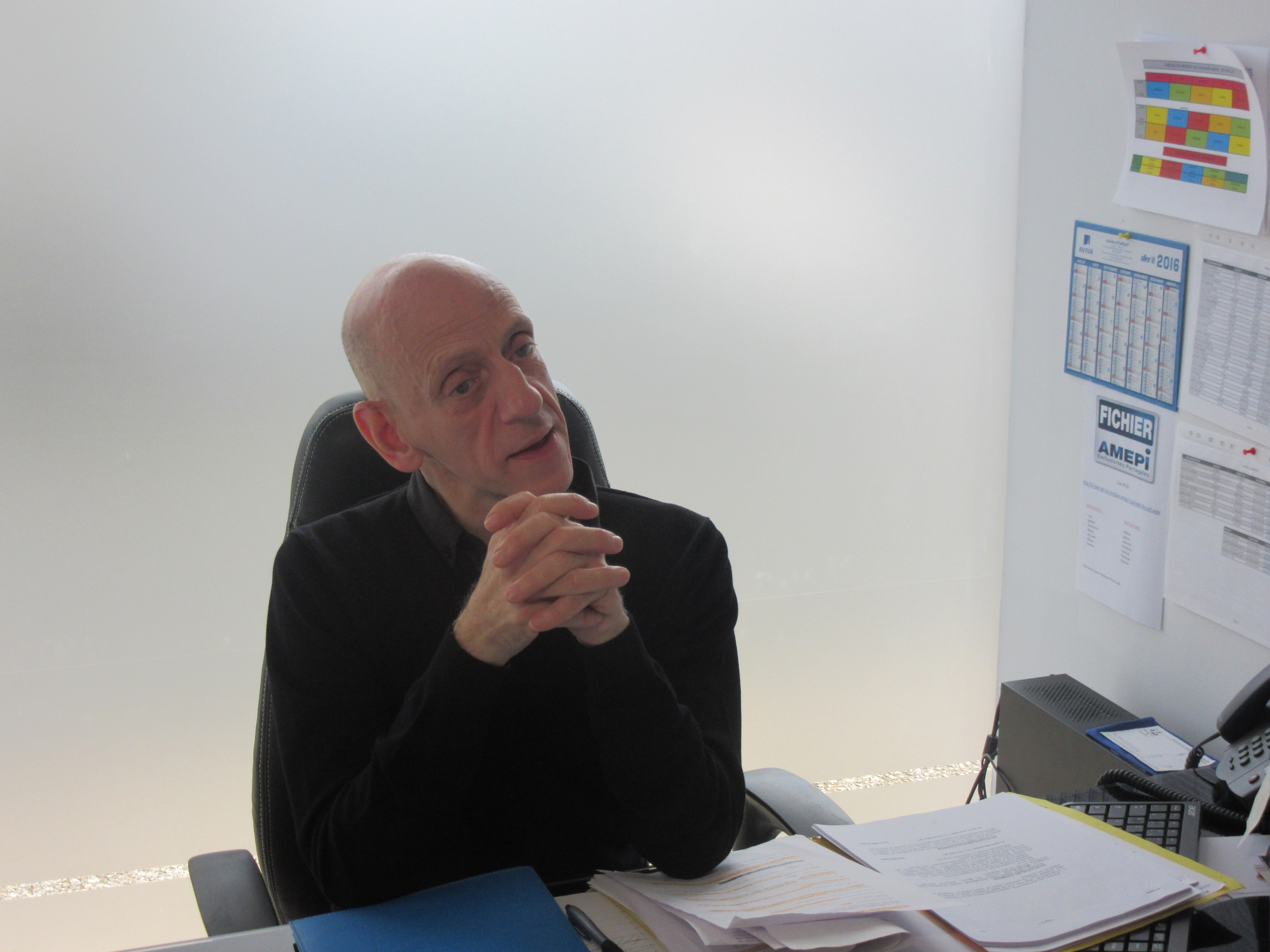 dans un film